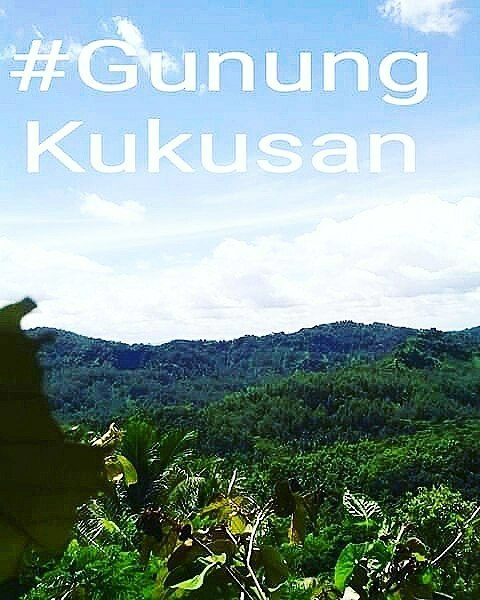 Gunung Kukusan